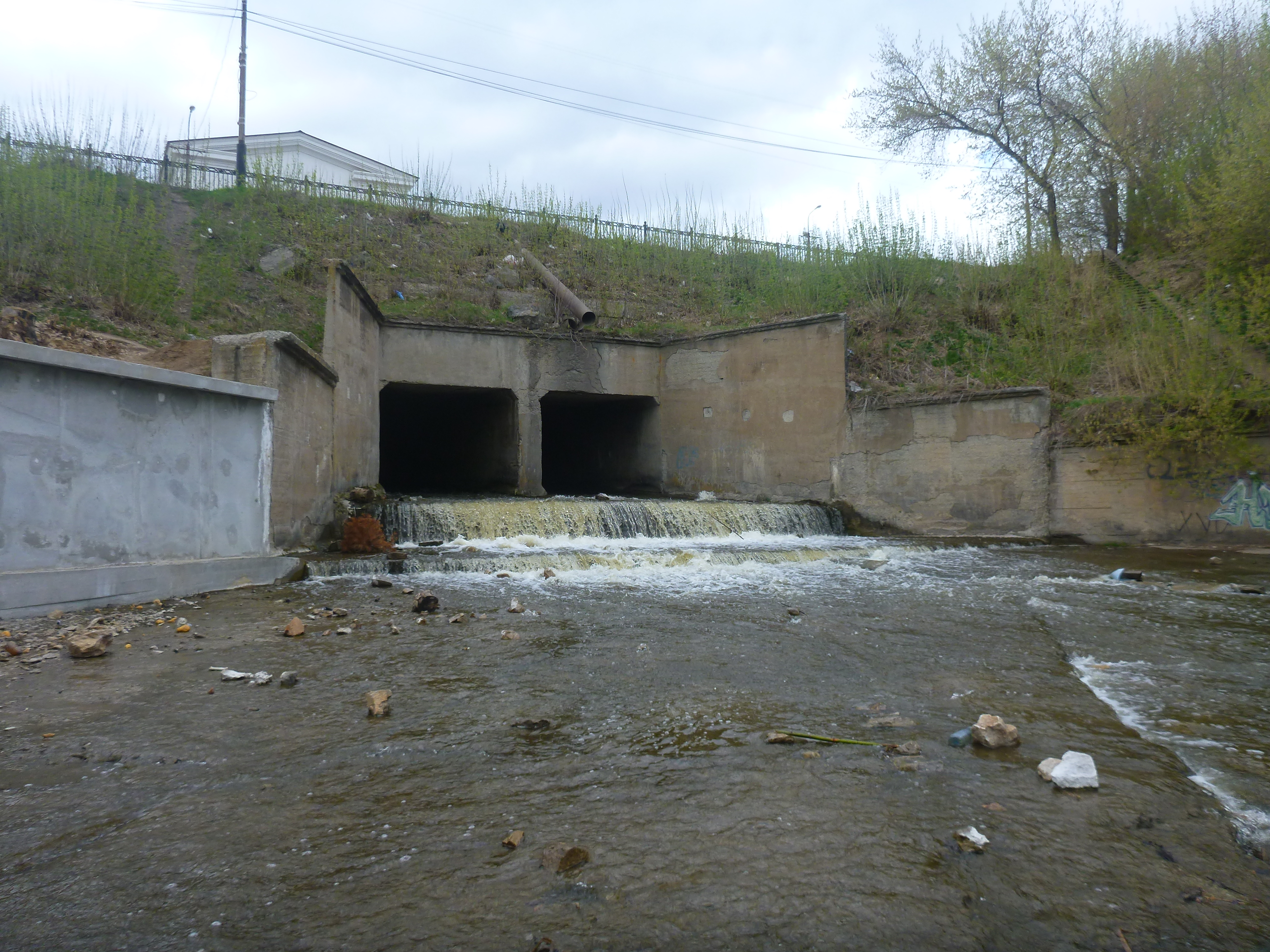 Шлюз Каменского завода